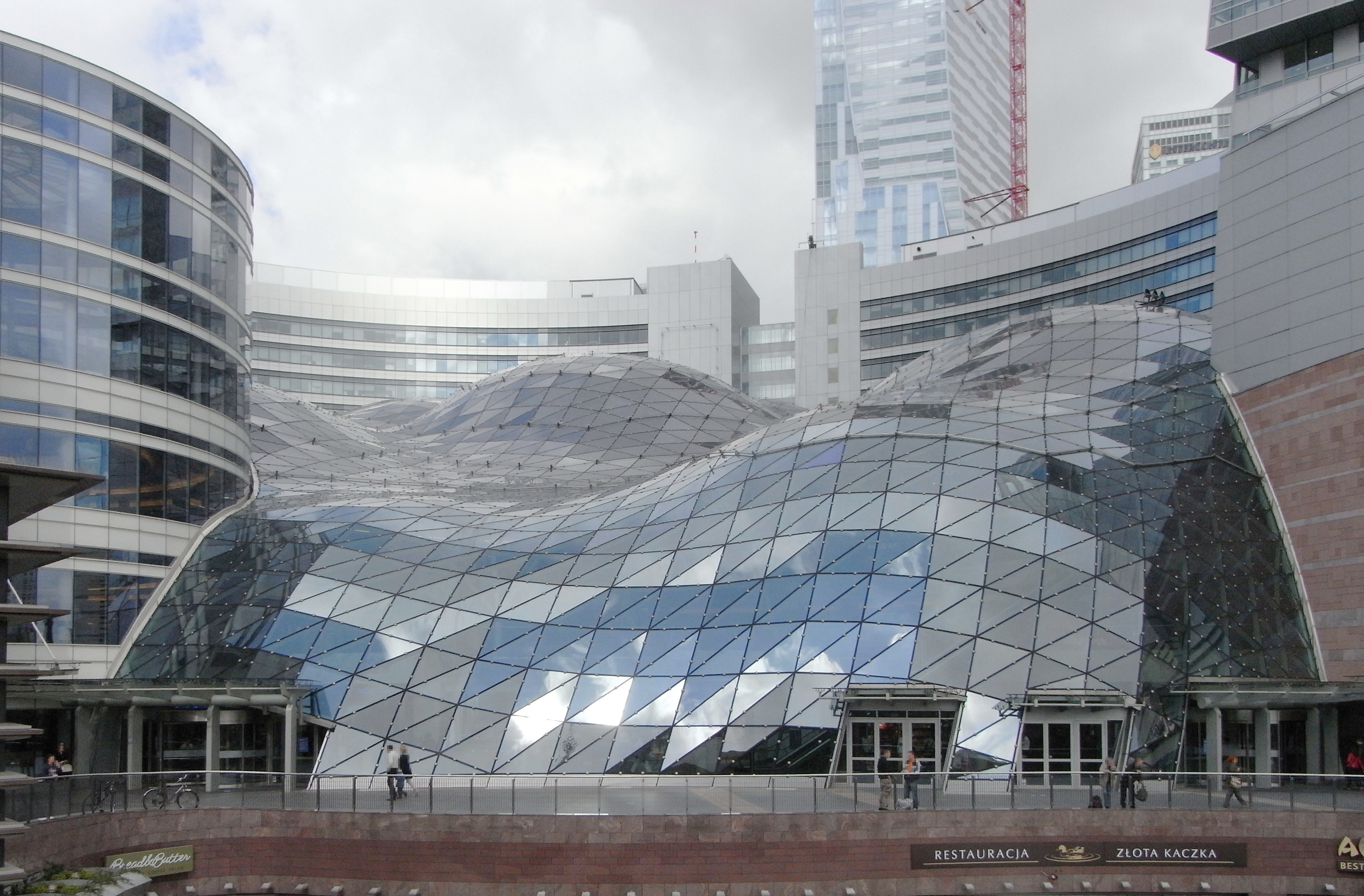 Einkaufszentrum in den "Złote Tarasy" (Goldenen Terrassen) in Warschau.